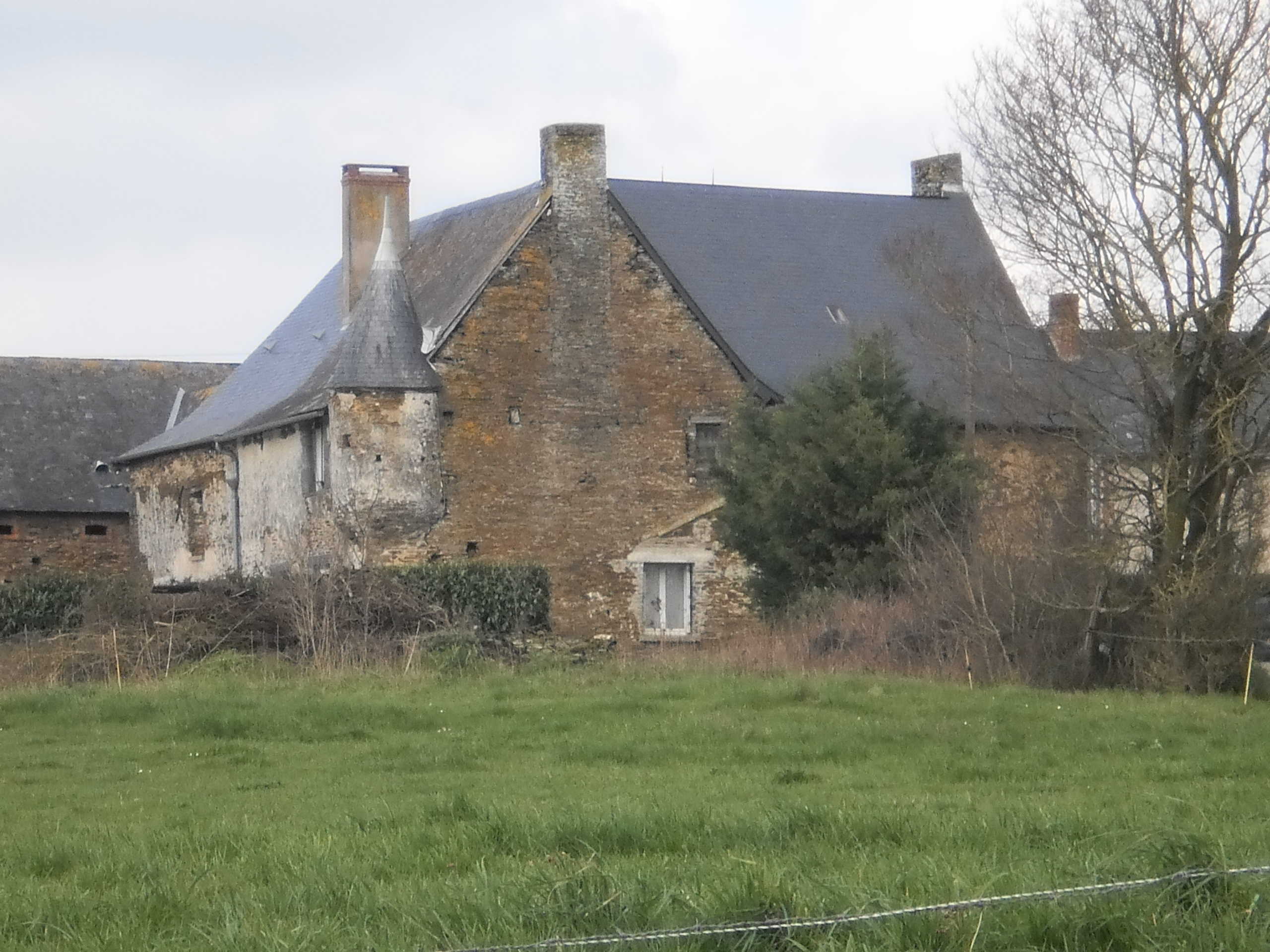 Vritz (Loire-Atlantique, France) - manoir de la Tesserie